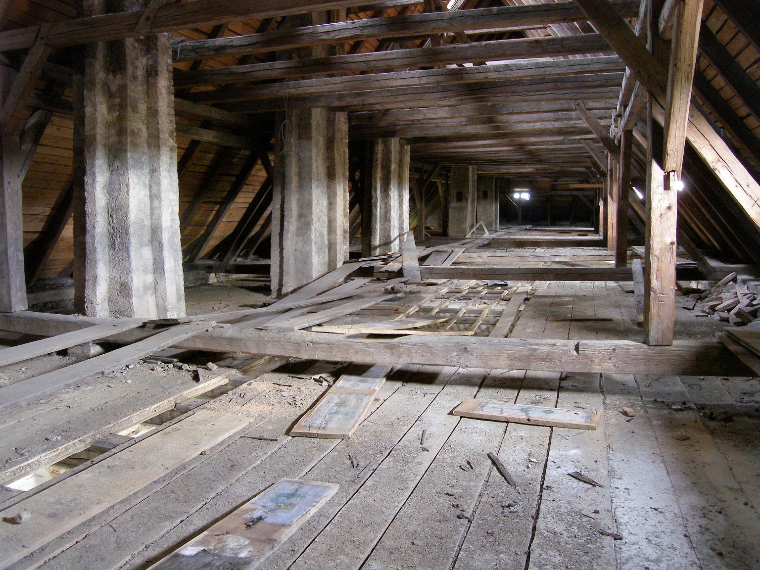 Toužim areál zámku. Pozůstatky malovaného dřevěného záklopového stropu z roku 1653 v patře jižního křídla Dolního zámku, pohled z podkroví před demontáží stropů.